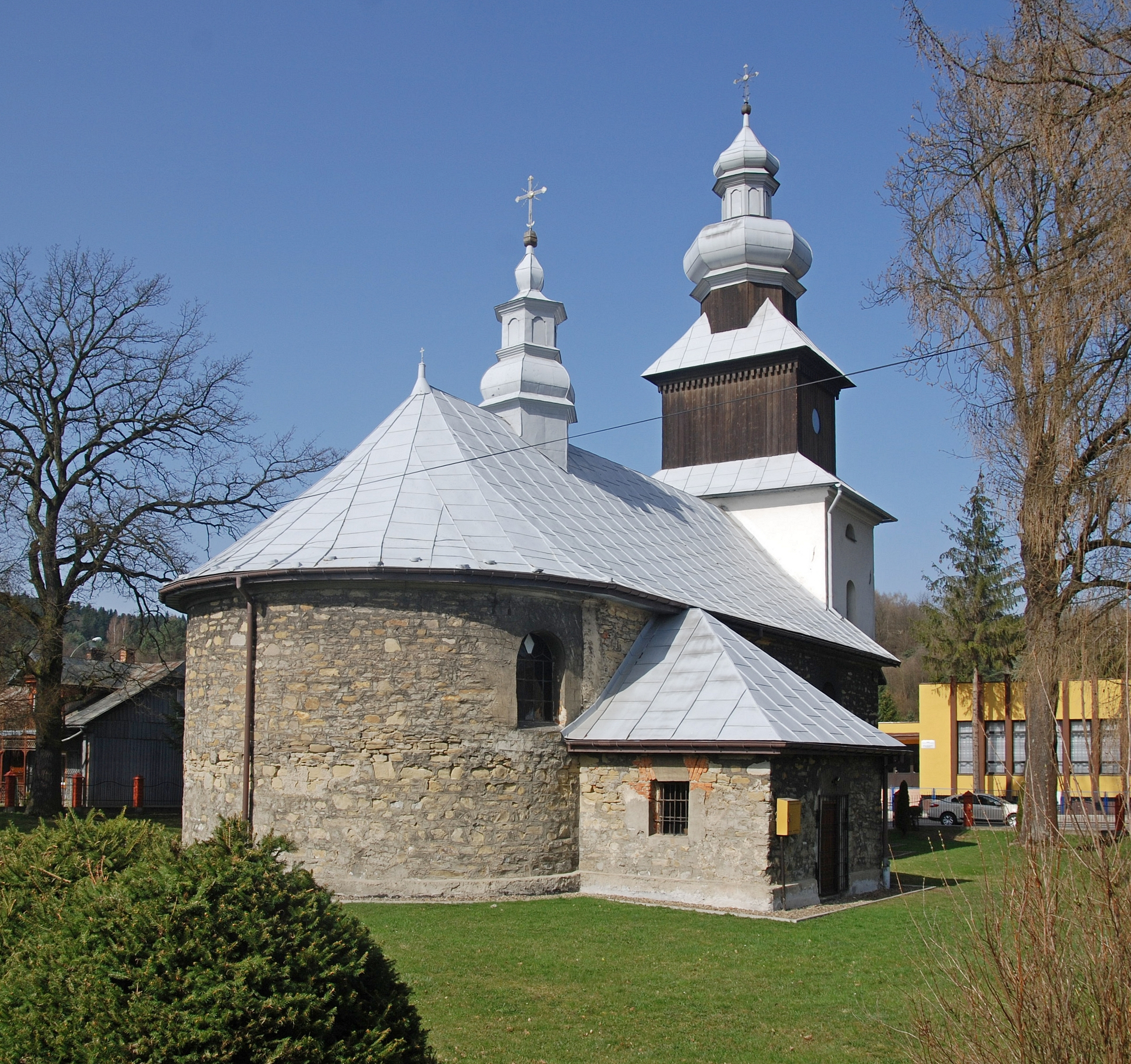 miasto Zagórz, cerkiew św. Michała Archanioła Wikidata has entry Q9187827 with data related to this item.